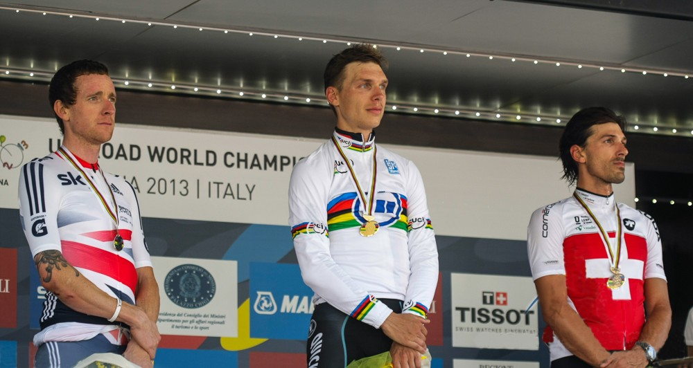 Podio del Campeonato Mundial de Ciclismo 2013.